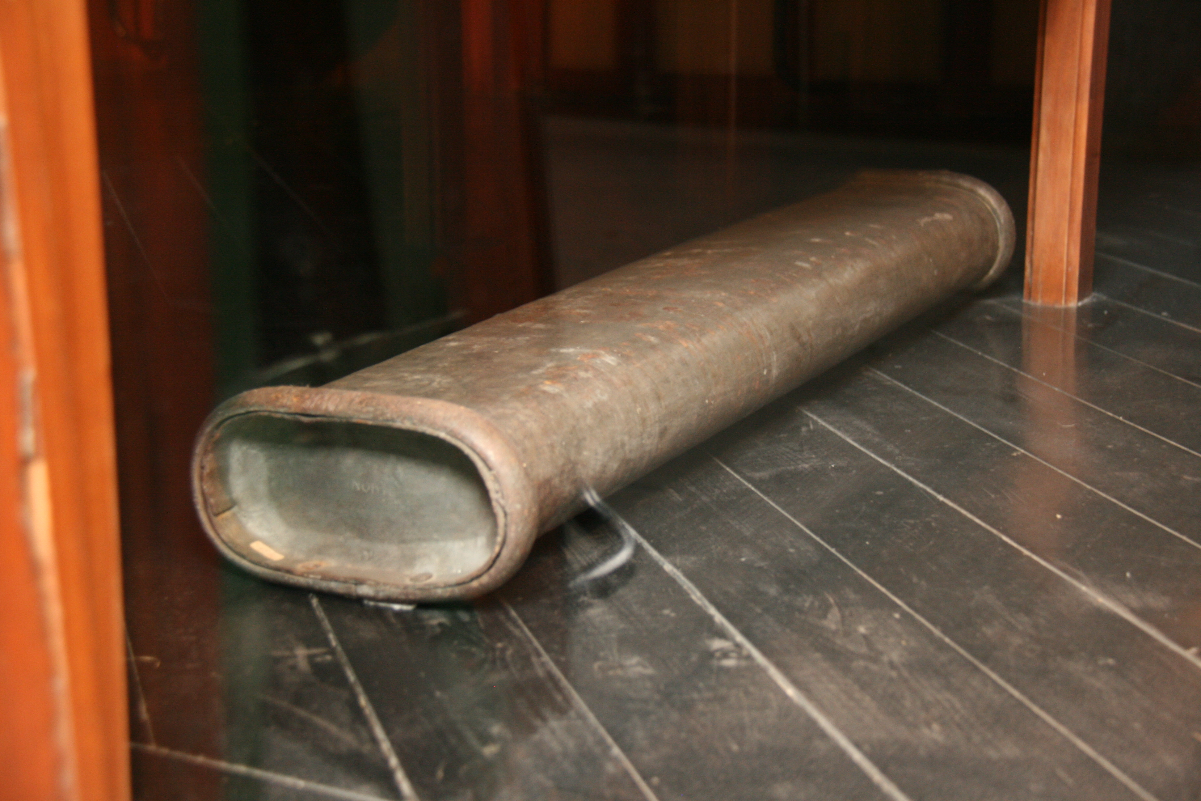 Calentador de pies en wagón